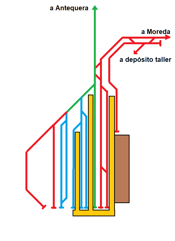 Esquema de vías actual Granada con la llegada del AVE en Junio de 2019 conexiones con Madrid y Barcelona